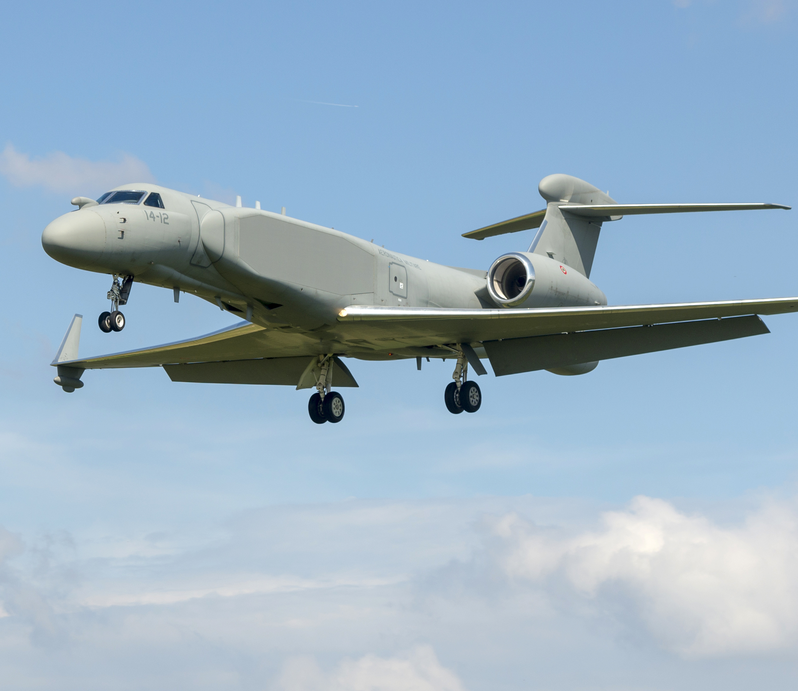 De Air Centric Personnel Recovery Operatives Course – kortweg Aproc – met als uitvalsbasis Gilze-Rijen, gebruikte oefengebieden in een ruime straal rondom de vliegbasis. Daardoor kon je bijvoorbeeld in Ede, het Peel-gebied maar ook België vergelijkbare taferelen zien. Geen Nederlandse cursus, maar een internationale – gestuurd van uit het Italiaanse hoofkwartier, en waarvan ieder deelnemend land bij toerbeurt gastheer is. Leidend is het European Personnel Recovery Centre (EPRC), 15 posities groot (plus 4 Host Nation Support) en gebaseerd in Poggio Renatico.